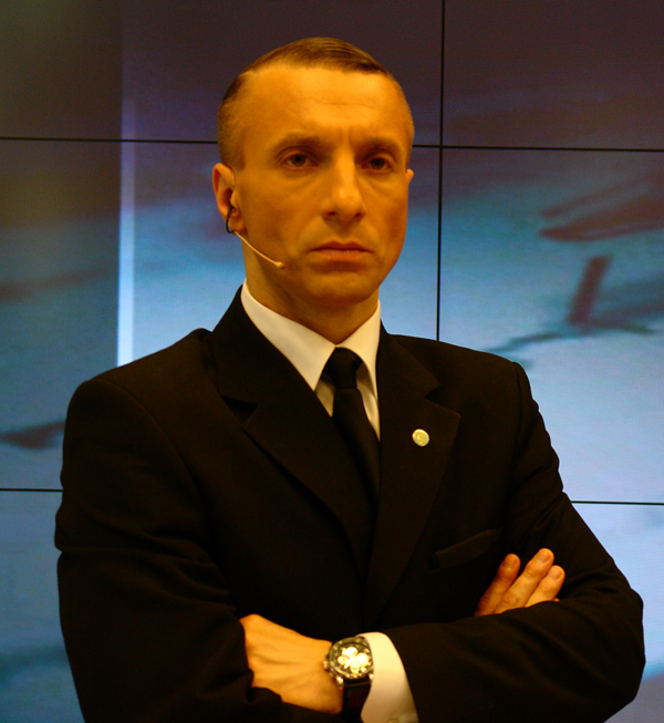 Волик Андрій Миколайович, кандидат економічних наук, поліграфолог. Видатний експерт і організатор у сфері поліграфології, основоположник української поліграфології.